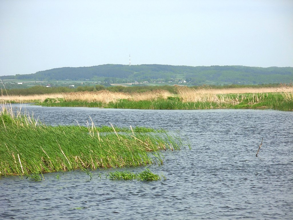 Rzeka Noteć, w oddali rezerwat przyrody Zielona Góra